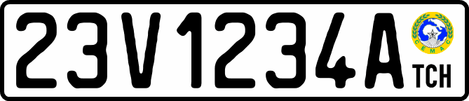 Схематичне зображення номерного знаку